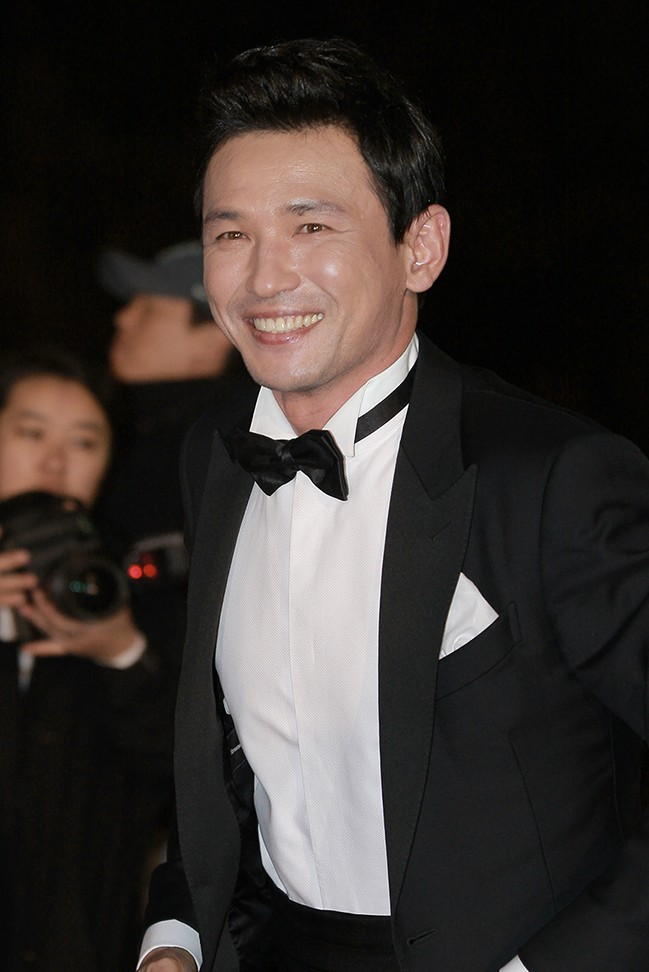 제34회 청룡영화상